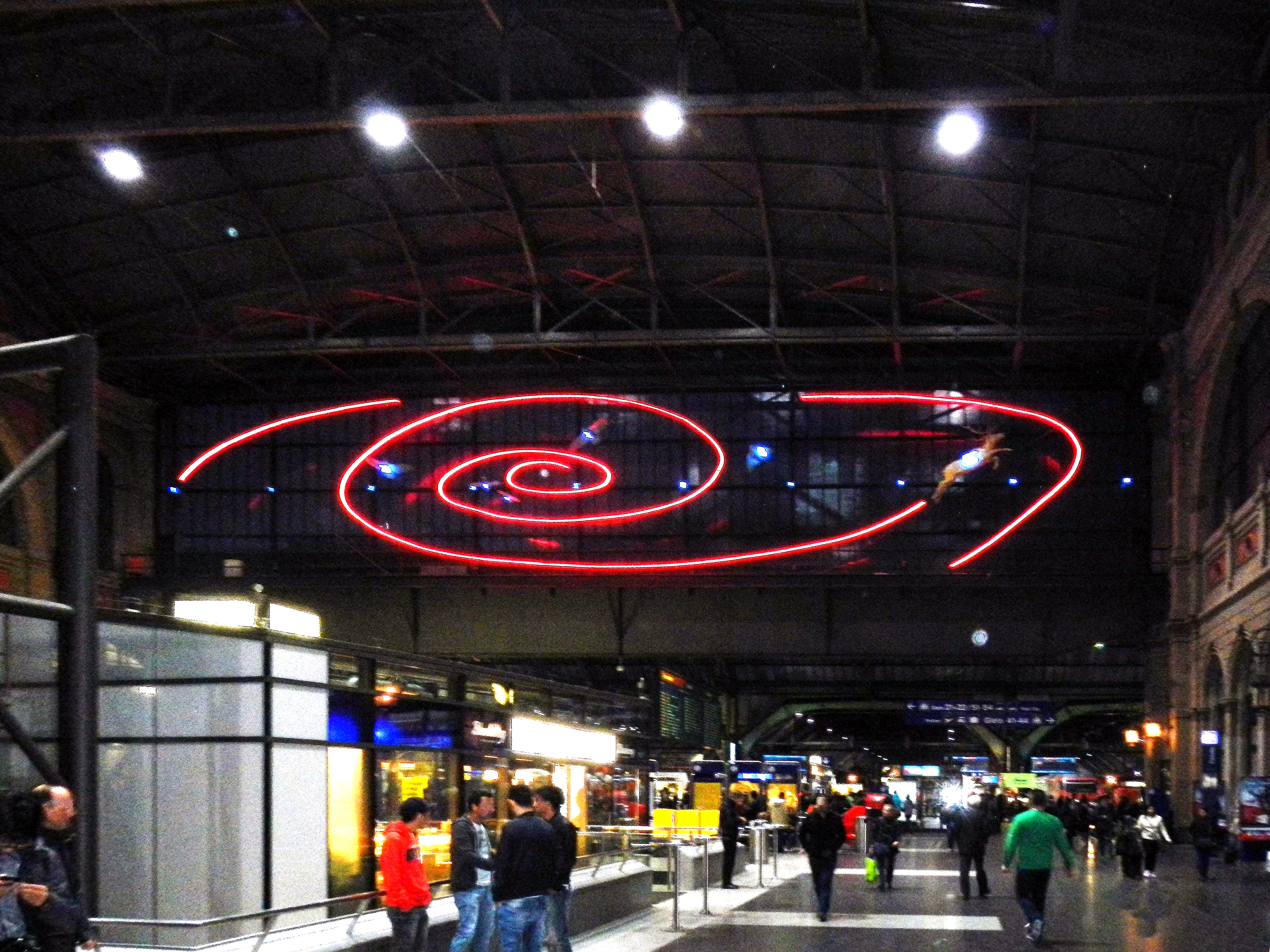 Halle des Zürcher Hauptbahnnhofes, Gebäudekonstruktion und Kunstwerk von Mario Merz (Spirale mit Fibonacci-Zahlen)